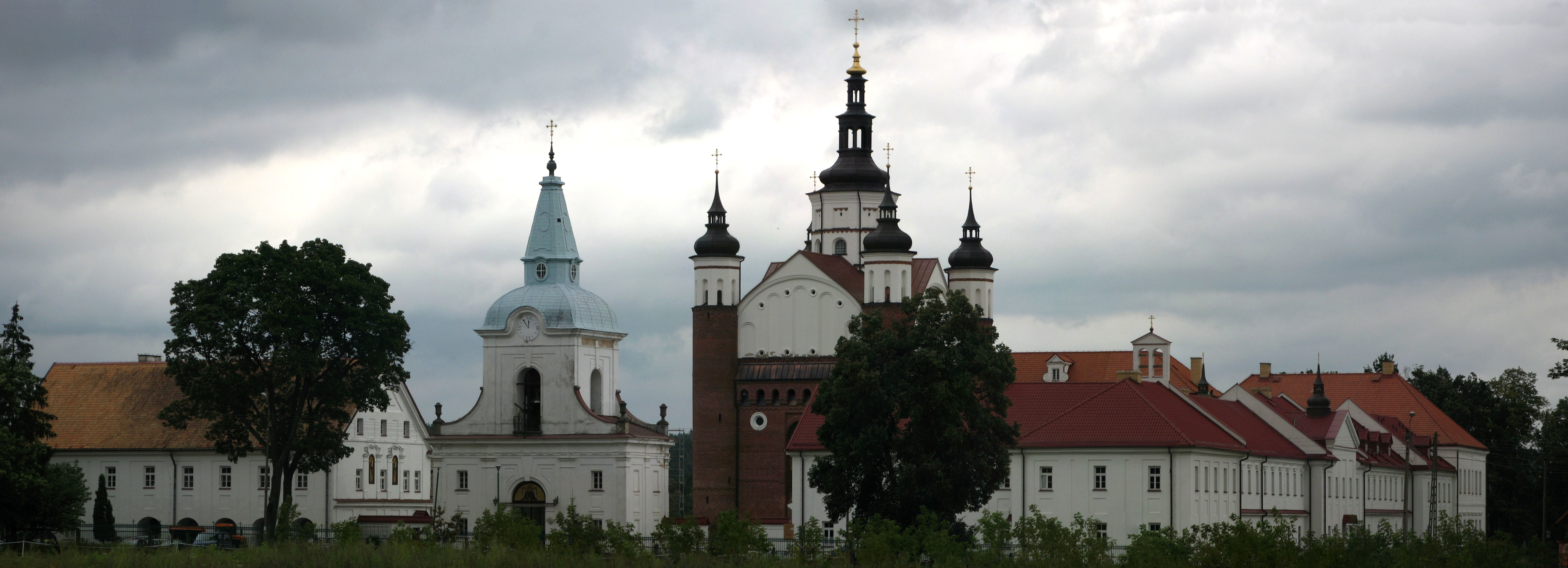 cerkiew p.w. św. Jana Teologa w zespole klasztornym bazylianów budynek południowy klasztoru w zespole klasztornym bazylianów budynek północno-zachodni klasztoru w zespole klasztornym bazylianów Supraśl, ul. Kościuszki, Supraśl 02.1953.